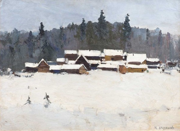 АЛАДЖАЛОВ, МАНУИЛ ХРИСТОФОРОВИЧ (1862-1934). Деревня зимой. 1910-е гг. Картон, дублирован на холст, масло. 52,5 х 74 см.